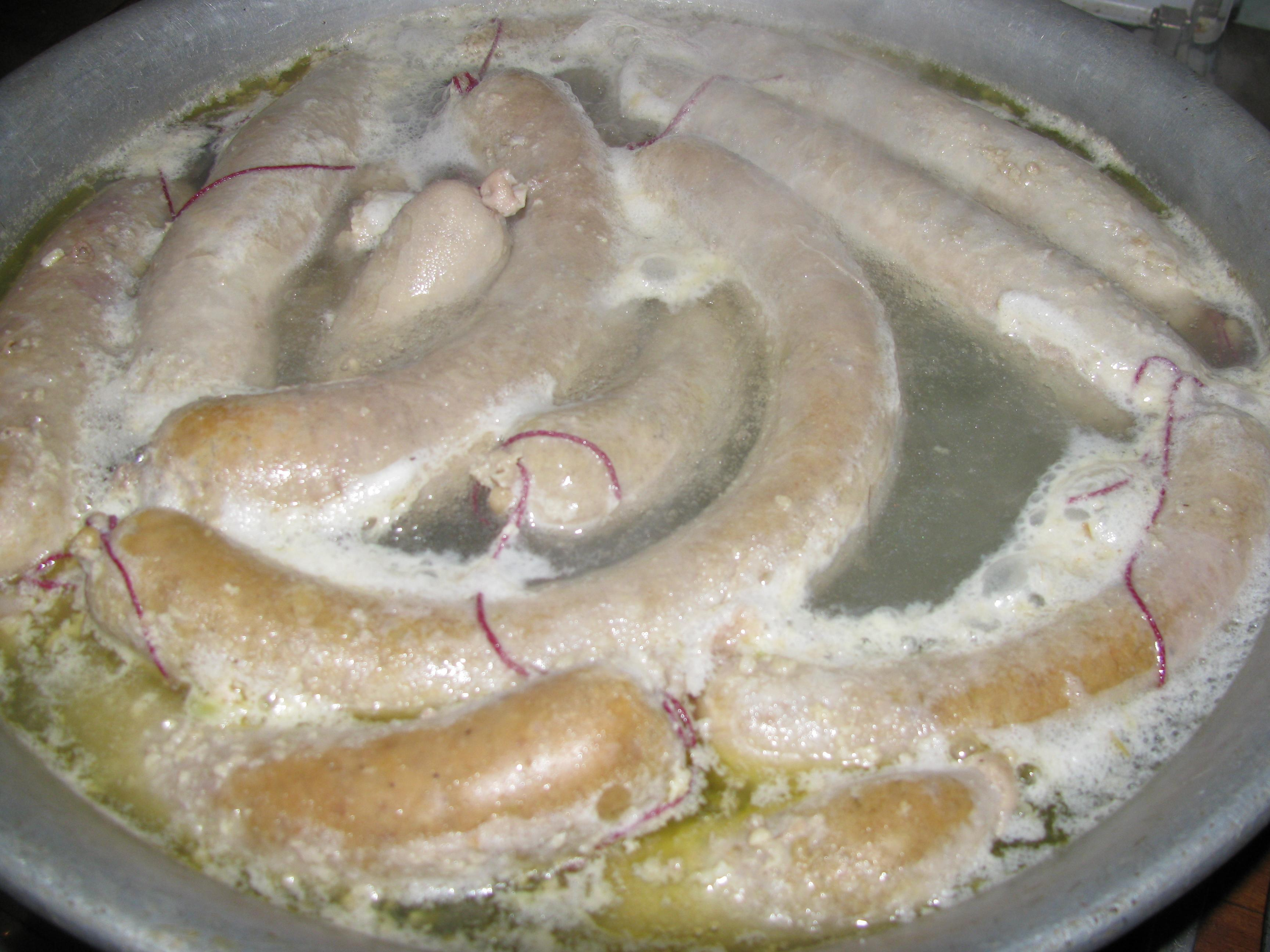 Паштетівка: процес відварювання ковбаси із м'яса, печінки та прянощів